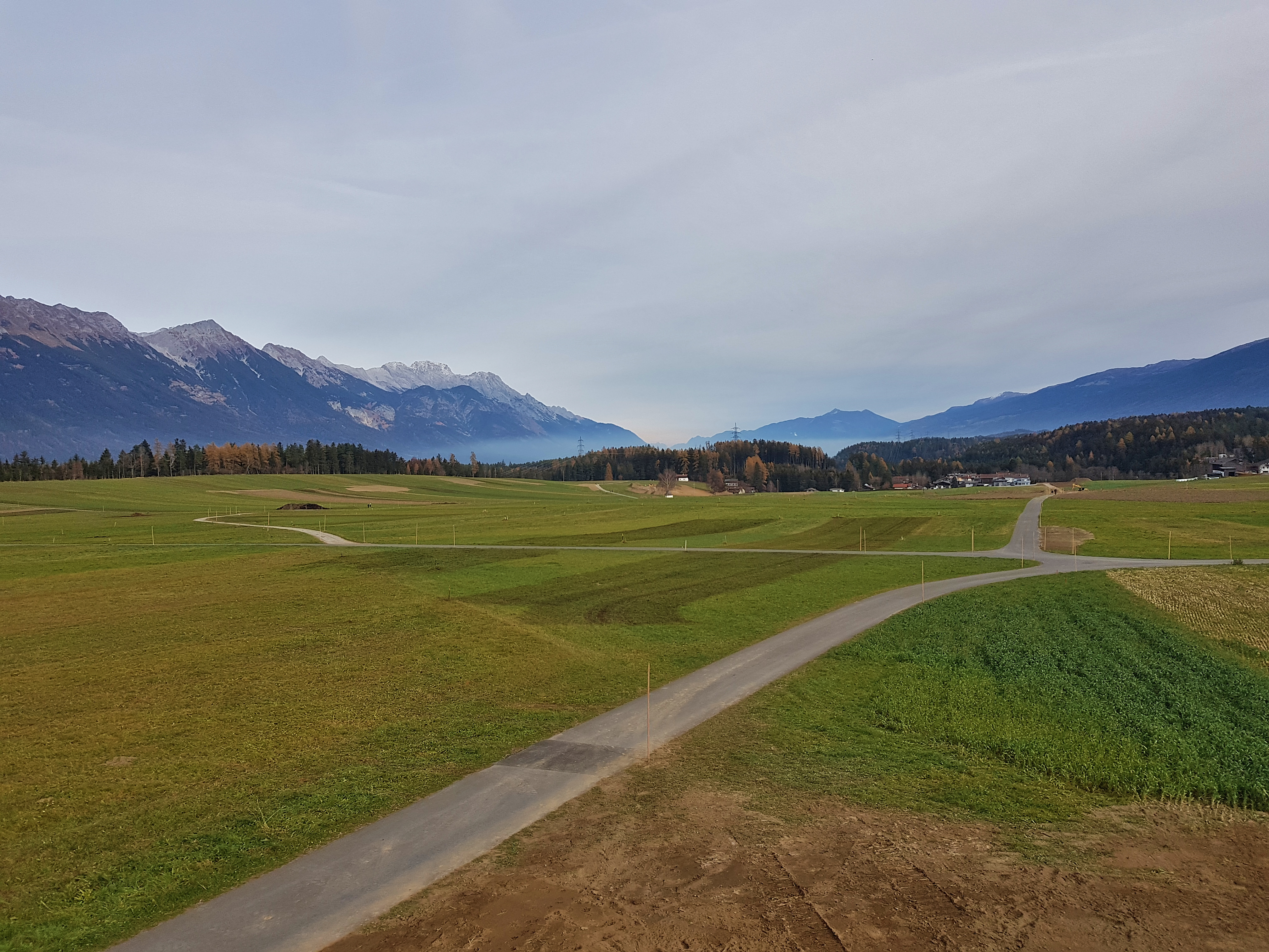 Unterer Feldweg Götzens